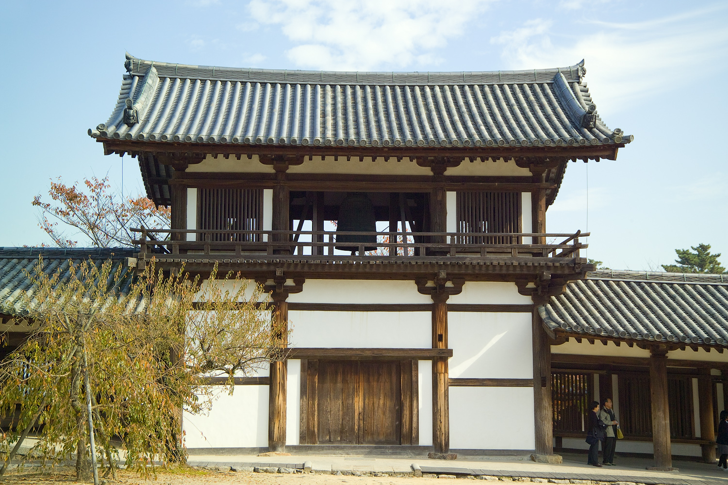 Hōryū-ji 法隆寺 Ikaruga Nara Prefecture Japan 奈良県生駒郡斑鳩町